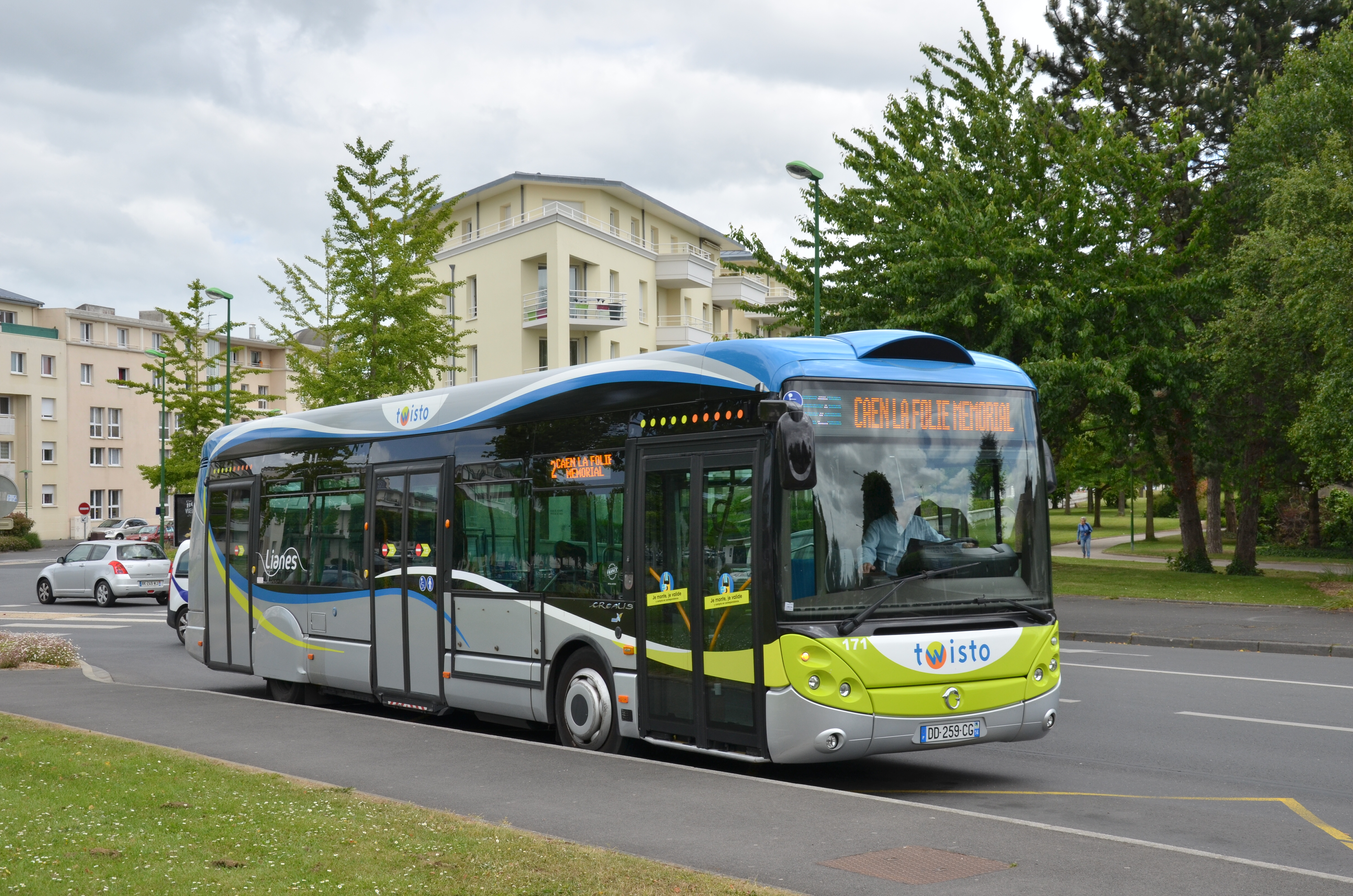 Irisbus Crealis 12 n°171 sur la ligne 2 du réseau TWISTO de Caen, au terminus Venoix Gallieni.